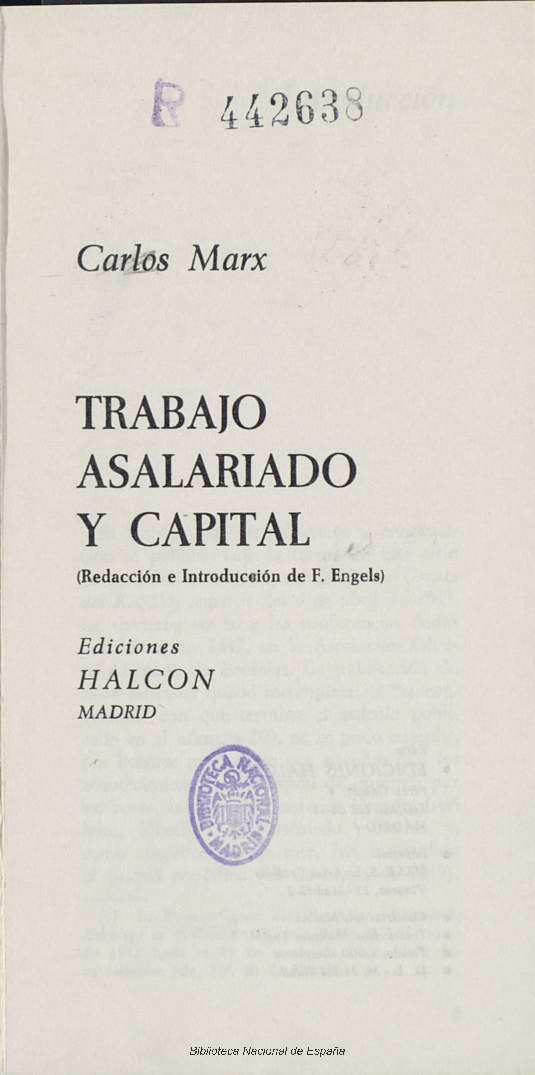 Trabajo asalariado y capital (Redacción e introducción de F. Engels) Traduccion de Mercedes Lucini Autor: Marx, Karl (1818-1883) ; Engels, Friedrich (1820-1895) ; Lucini Bayod, Mercedes Fecha: 1968 Datos de edición: Madrid, Halcon